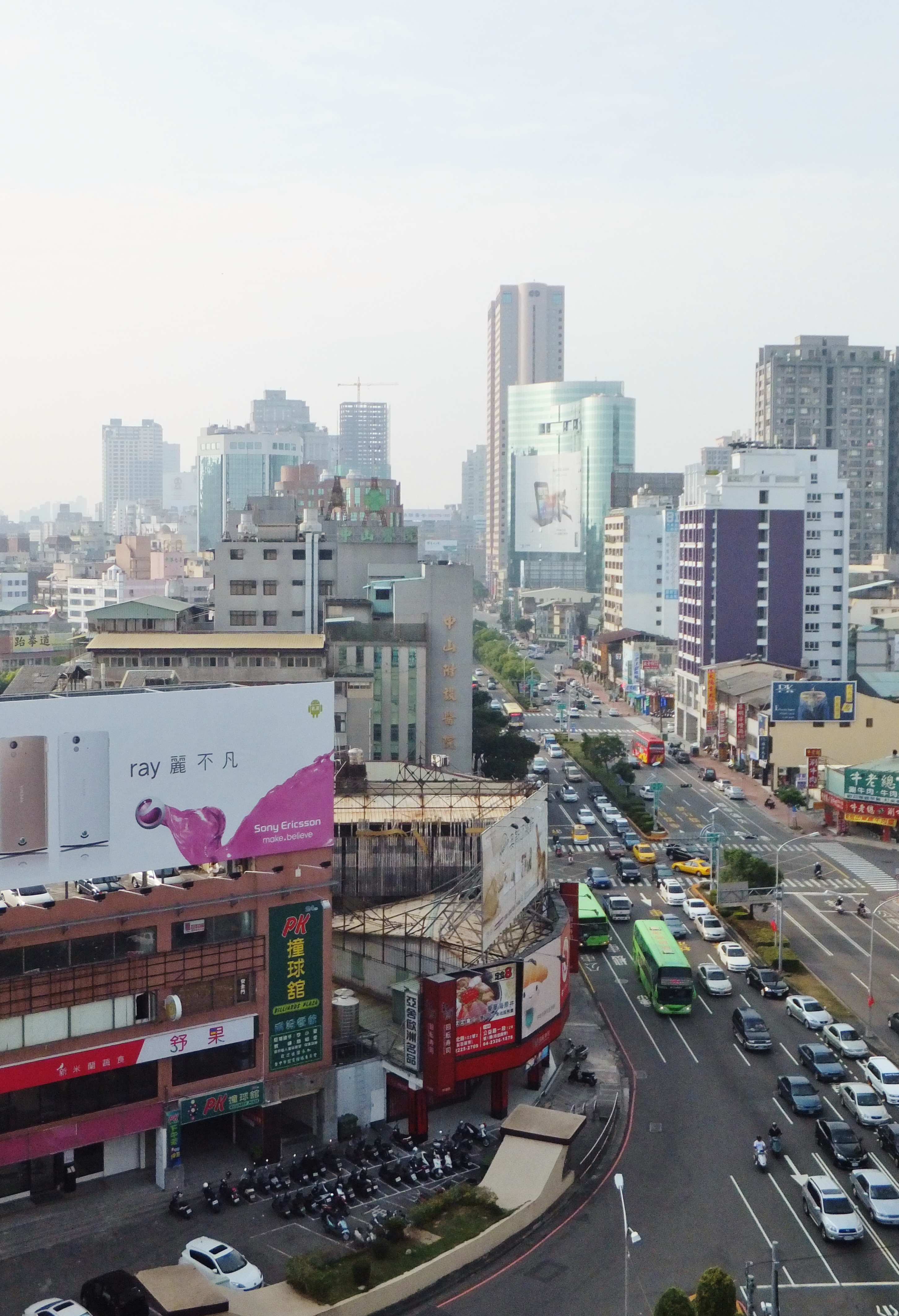 由中港大飯店西望中山醫學大學附設醫院東面與臺中港路一段。